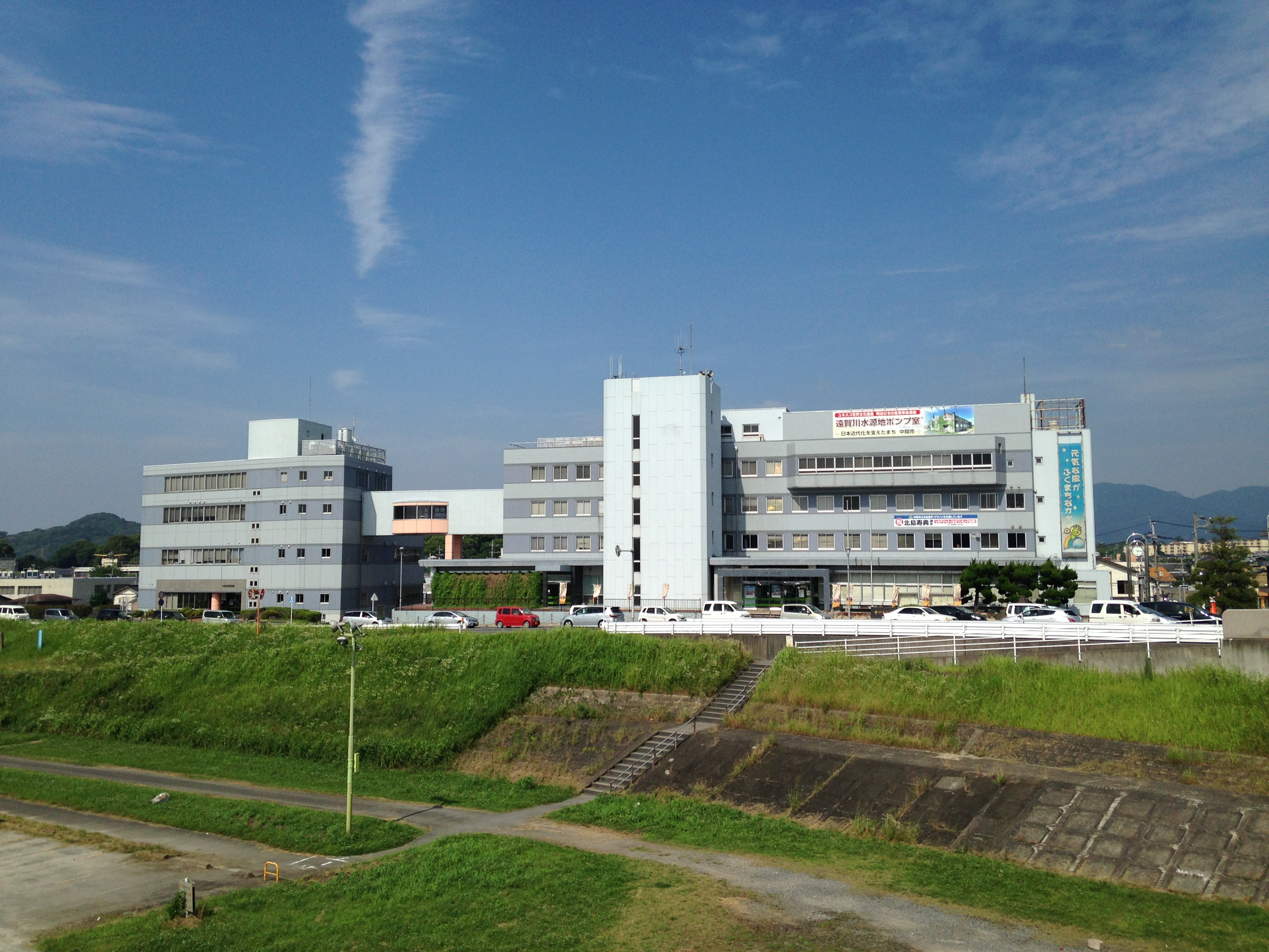 遠賀橋より望む中間市役所